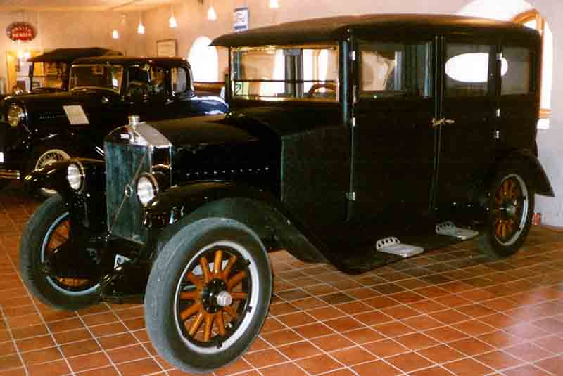 Volvo PV4 4-Door Sedan 1927